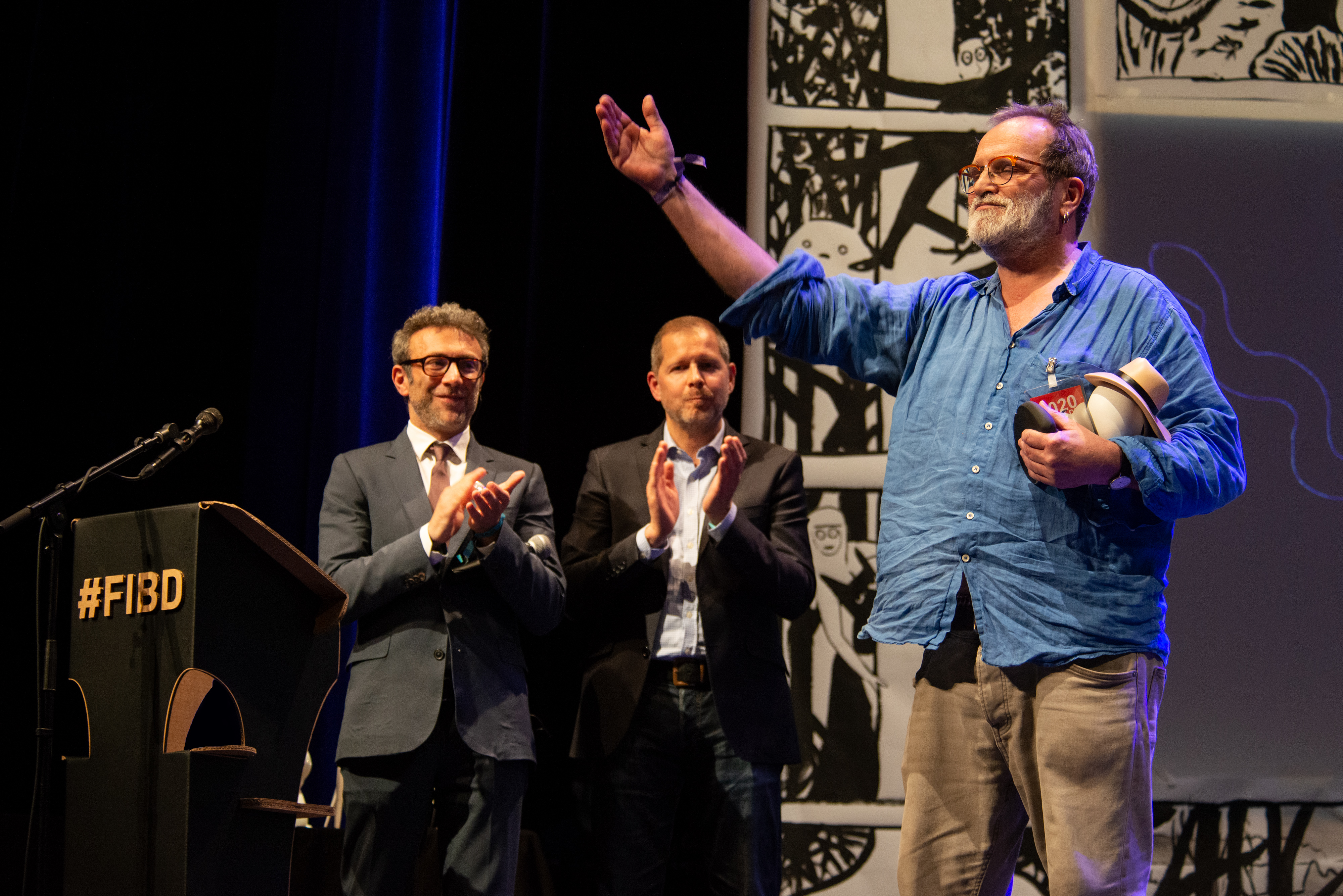 Cérémonie des Fauves, Festival International de la Bande Dessinée d'Angoulême 2020.